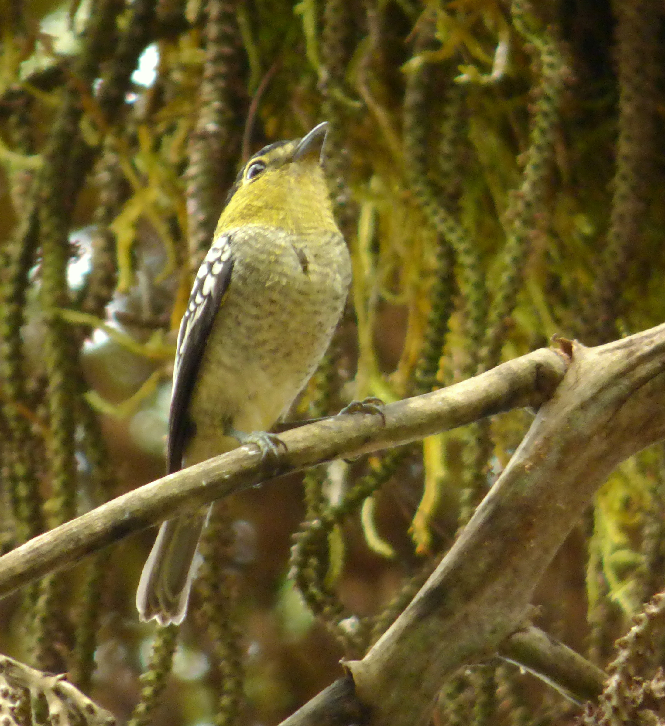 Pachyramphus versicolor (Cabezón barrado) - Macho